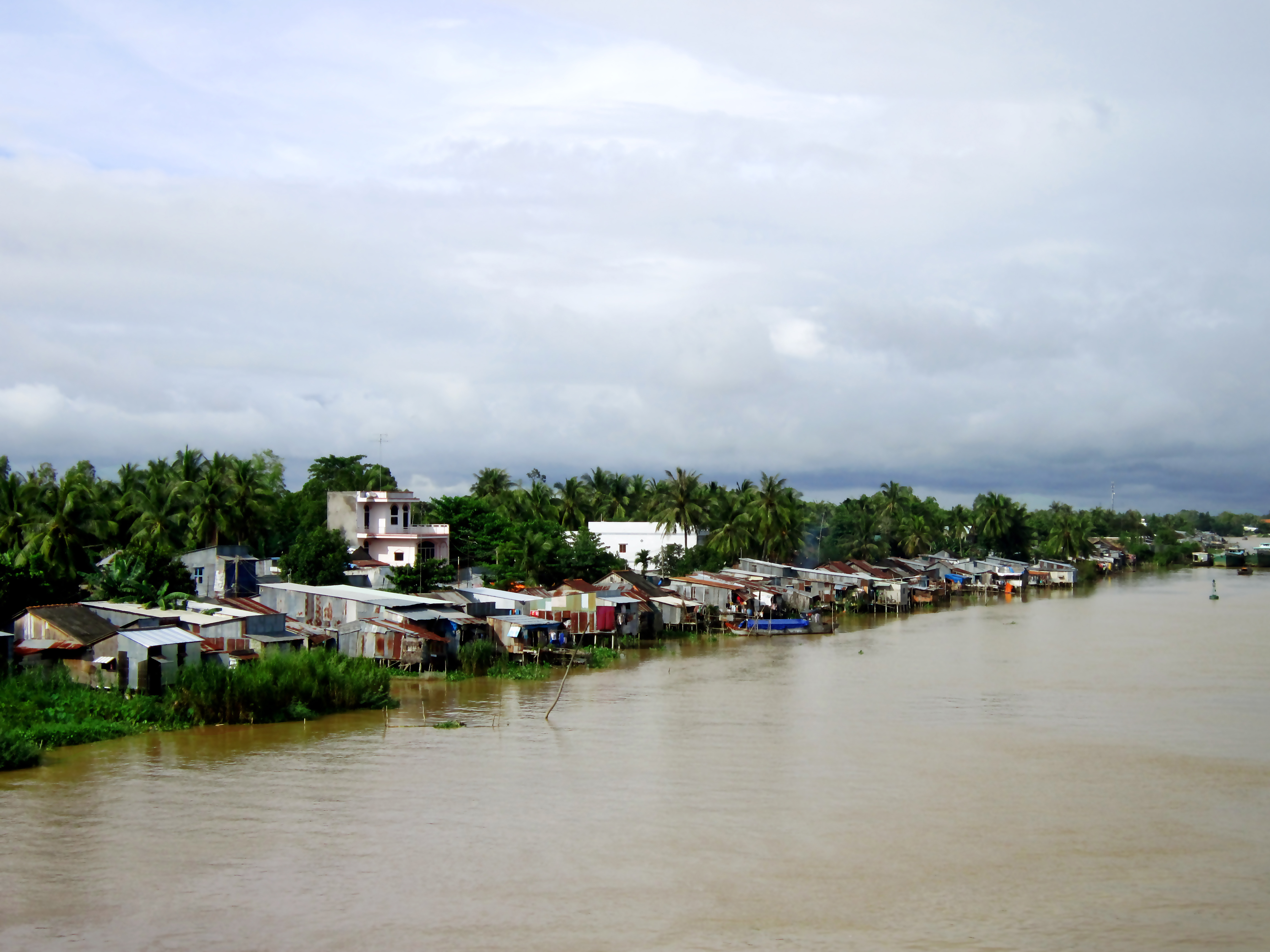 Nhà ven sông ở Mỹ Hòa (Long Xuyên, An Giang, Việt Nam). Sông trong ảnh là sông (còn gọi là rạch) Long Xuyên.